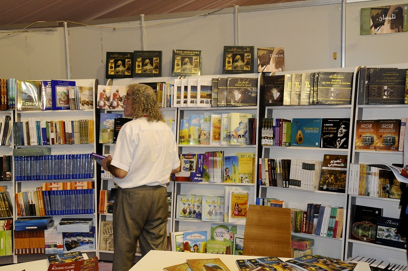 [Fidet Mansour] The 16th Algiers International Book Fair (SILA) brought together more than 500 publishers from across the globe. المعرض الدولي للكتاب في الجزائر العاصمة يسجل مشاركة أكثر من 500 ناشر من جميع أنحاء العالم La 16ème édition du Salon international du livre d'Alger (SILA) a réuni plus de 500 maisons d'édition venues du monde entier.